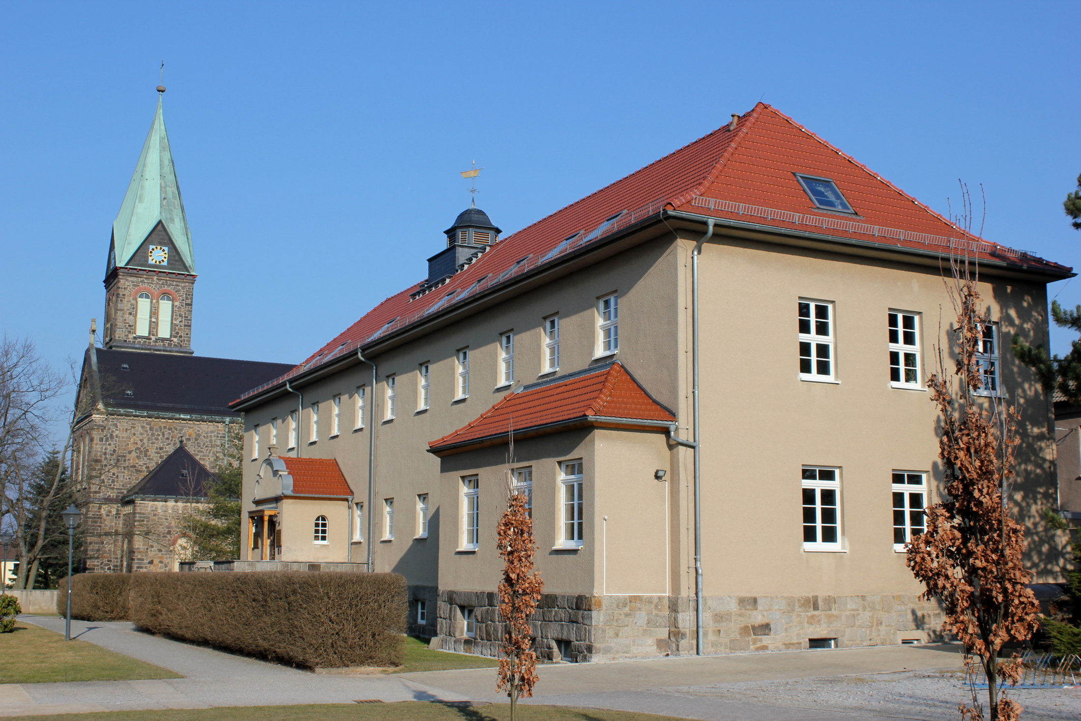 Hornjoserbsce: Serbska wyša šula "dr. Marija Grólmusec" w Radworju.